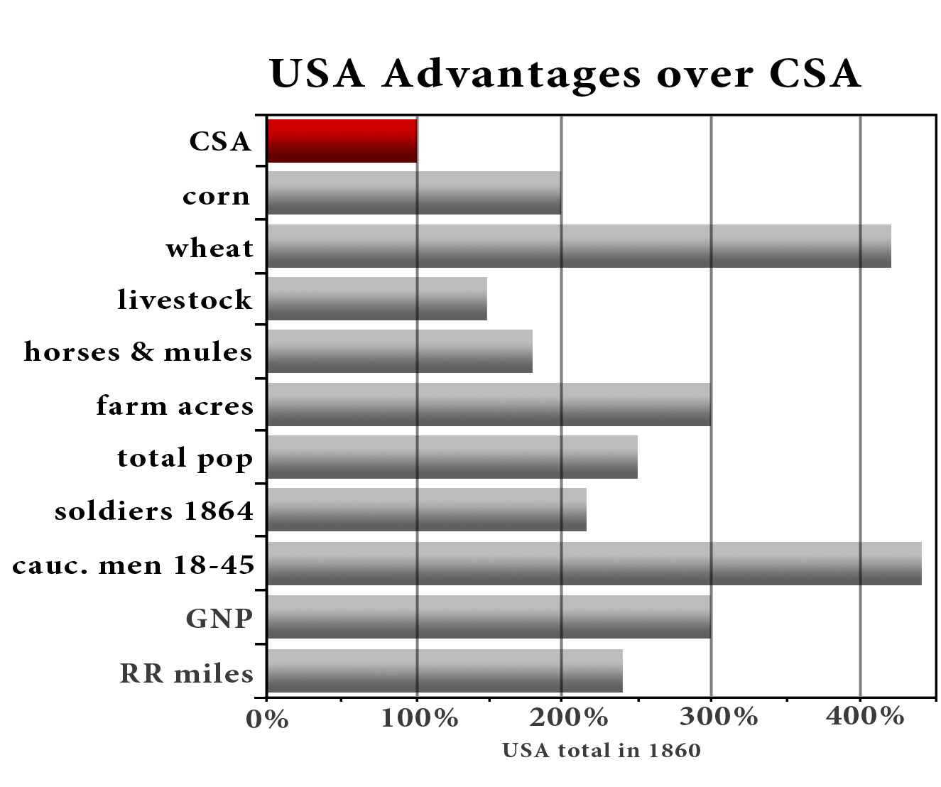 US economic advantages over CSA 1860 US economic advantages over CSA 1860